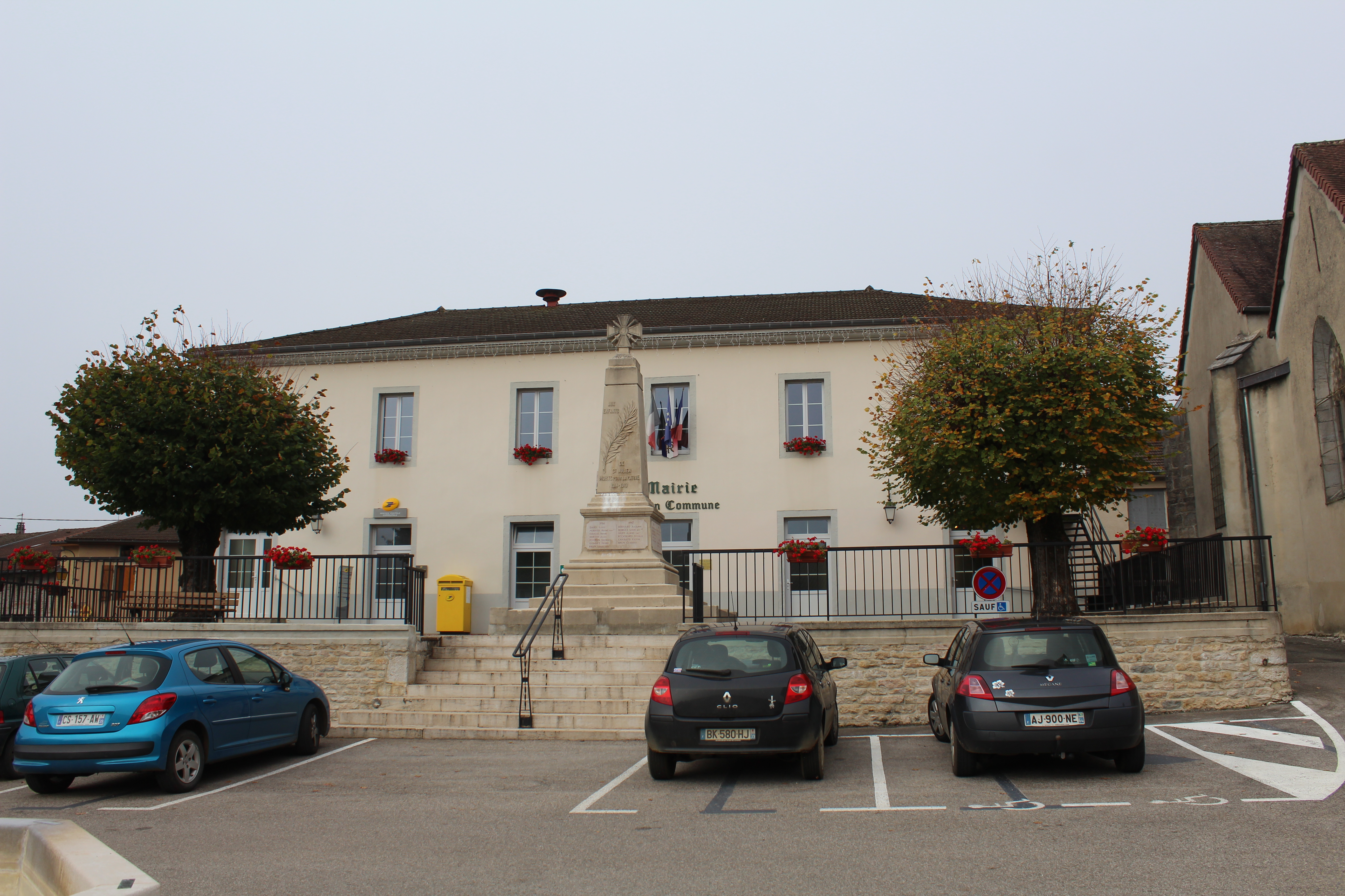 Mairie de Saint-Julien, Val-Suran.